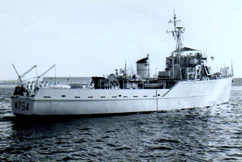 M754 CANOPUS dragueur de mines français